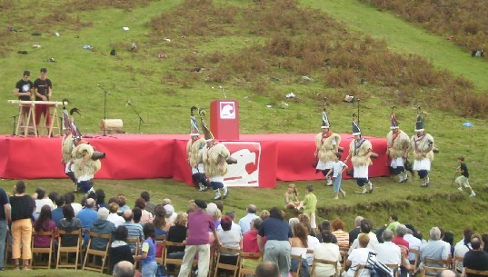 Cuatro parejas de zanpantzar desfilan ante un escenario en el que una pareja toca la txalaparta en el Gudari Eguna de 2006.